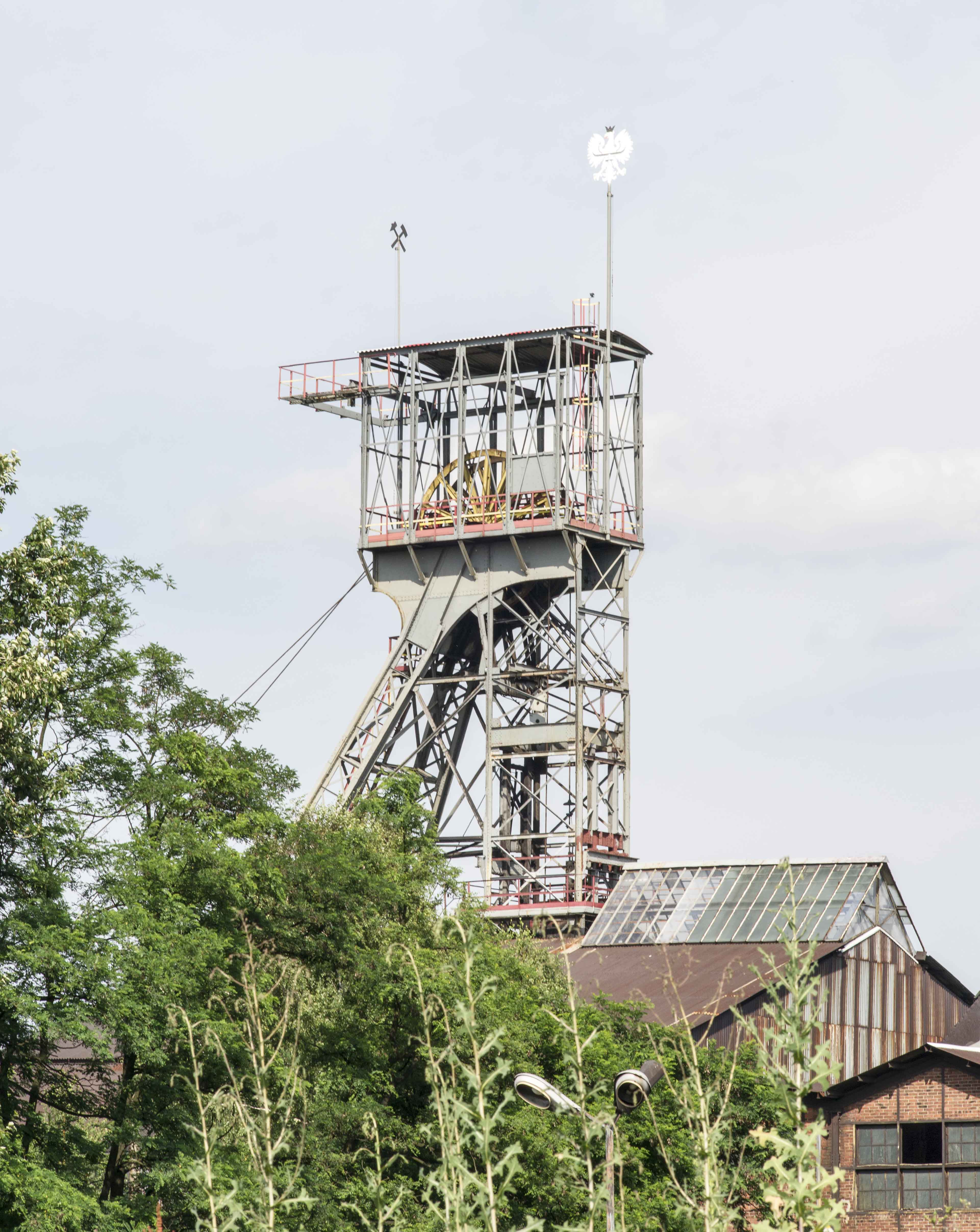 Grube Castellengo in Zabrze, Polen, Schacht Staszic